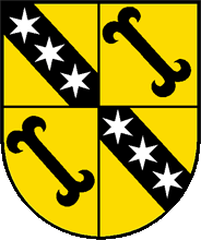 Wappen von Niederurnen Kanton Glarus Schweiz